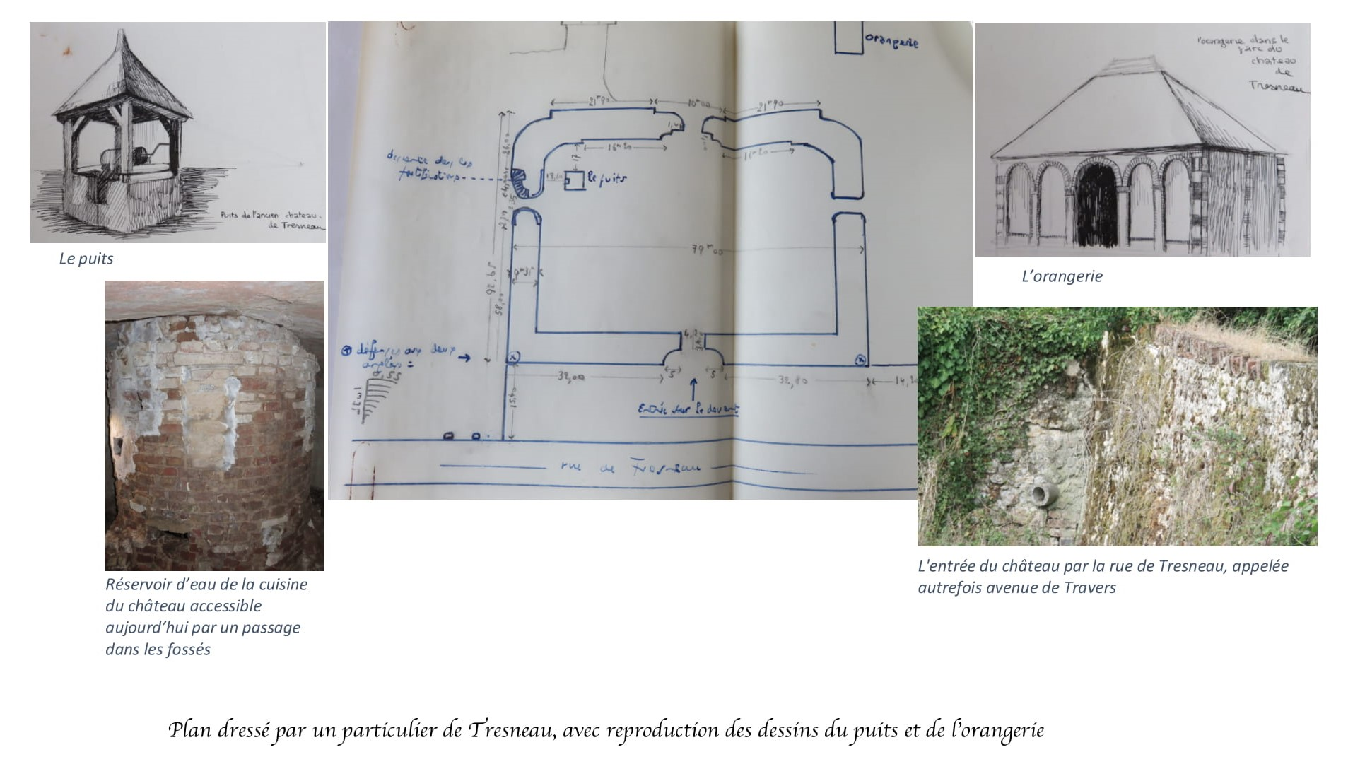 Plan de l'emplacement du château de Tresneau avec dessins du puits et de l'orangerie